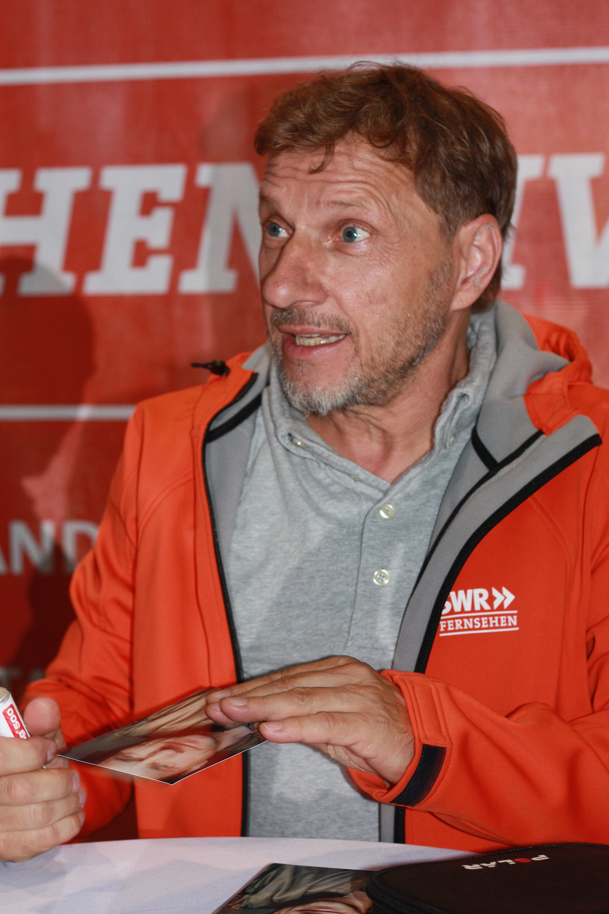 Richy Müller war am 8. Juli 2016 zu Gast beim SWR Sommerfestival in Mainz. Nach der Open Air Tatort-Premiere HAL gab er zusammen mit Felix Klare und Jens Hübschen eine Autogrammstunde. IMG 7805